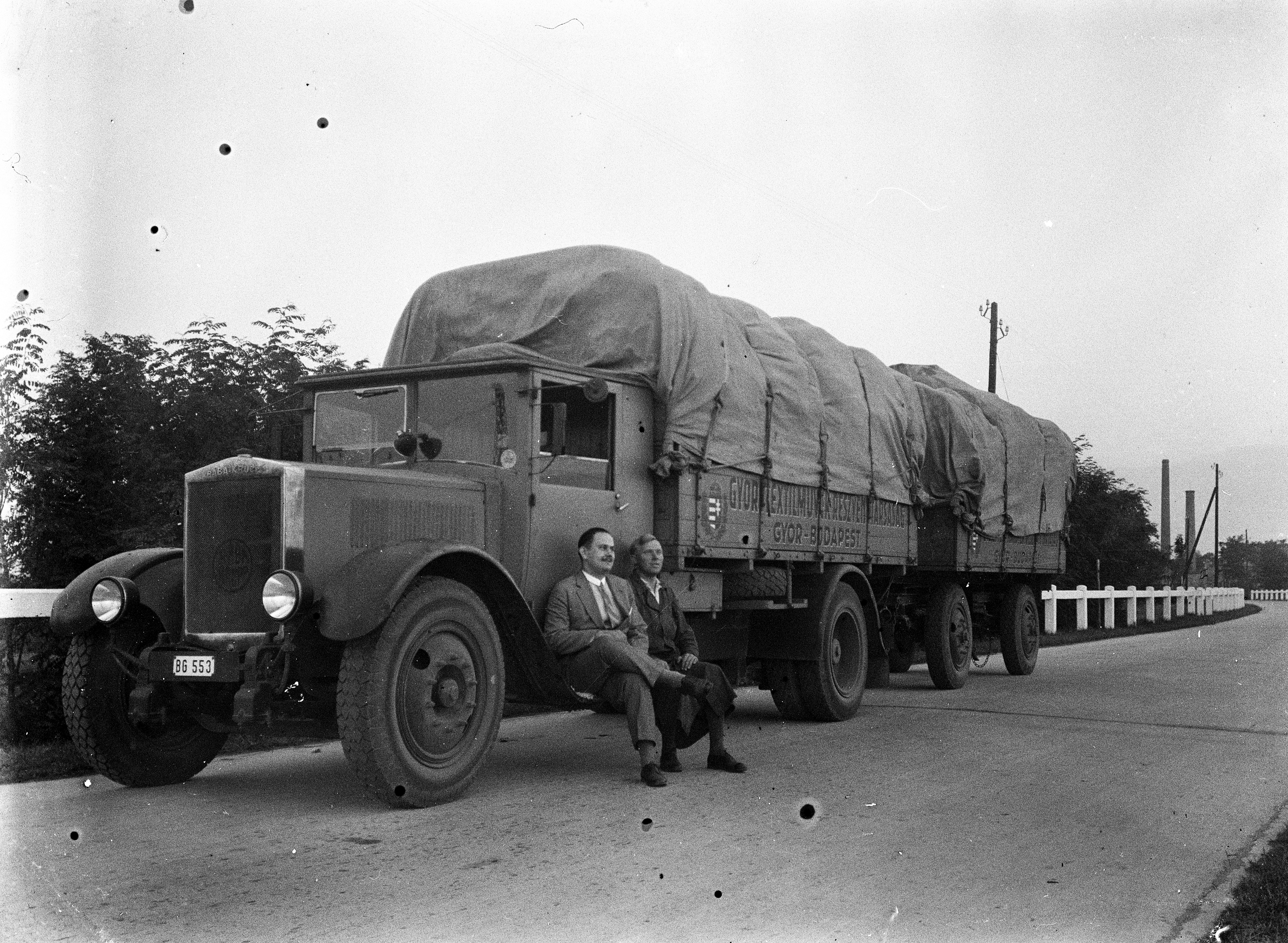 10-es főút. Location: Hungary Tags: number plate, commercial vehicle, Hungarian brand, license, Rába-brand, Krupp-brand, trailer, crest Title: 10-es főút.